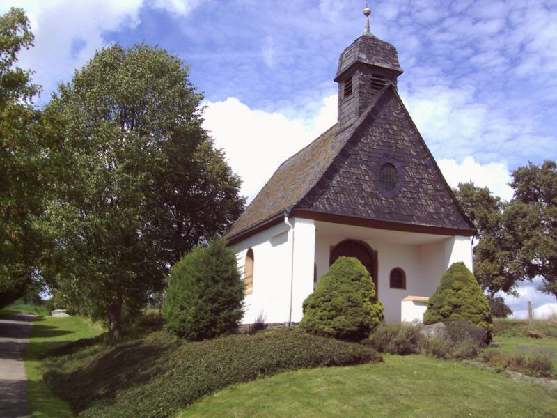 Womrath: römisch-katholische Werner-Kapelle